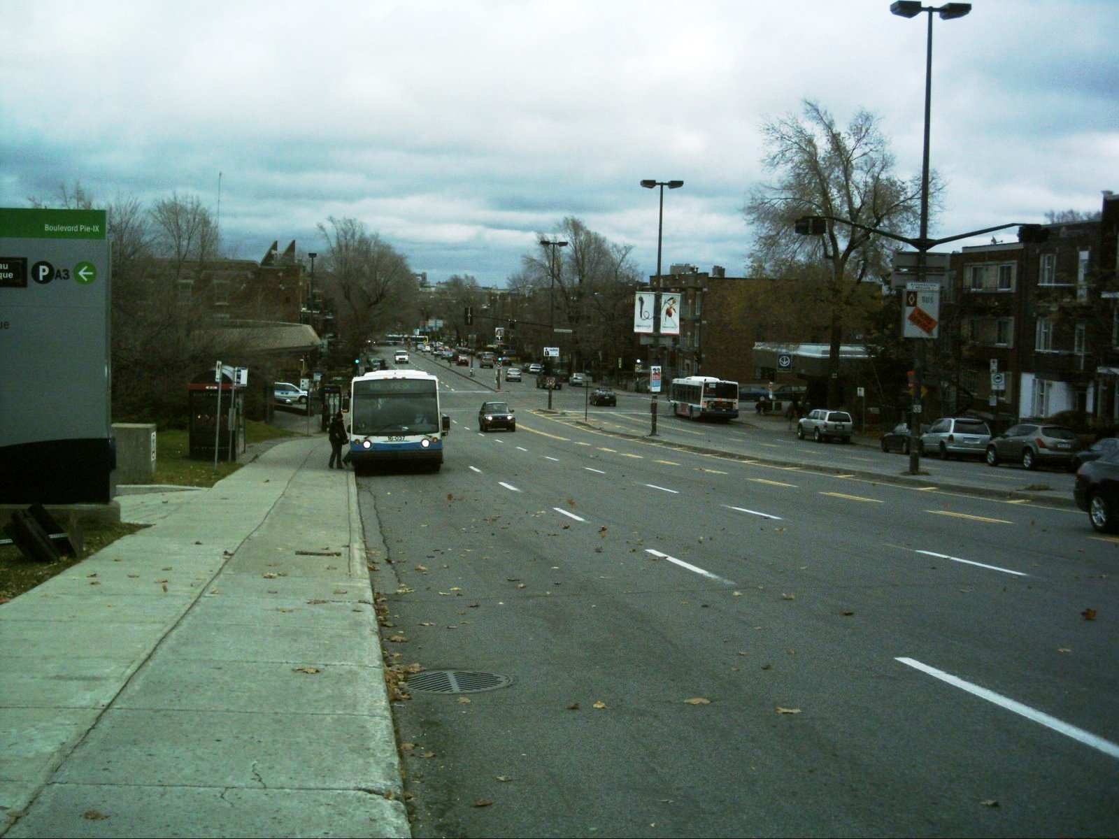 Le boulevard Pie-IX à Montréal vu de la station de métro Pie-IX.